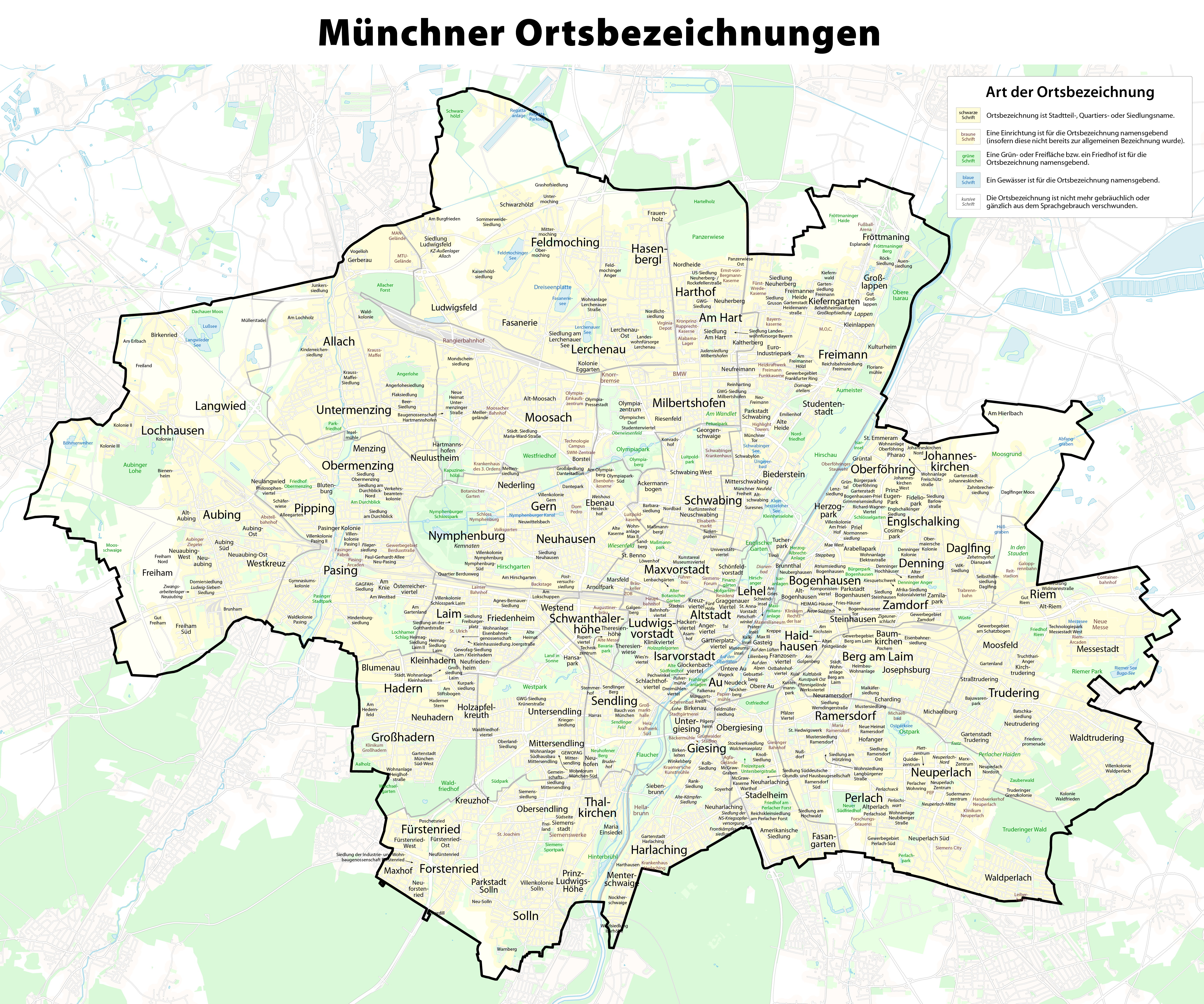 Karte der Ortsbezeichnungen in MünchenHinweis: Die dargestellten Ortsbezeichnungen wurden aus diversen Quellen zusammengetragen und erheben weder Anspruch auf Richtigkeit noch auf Vollständigkeit.Für Hinweise, Korrekturen und Ergänzungen bin ich deshalb jederzeit dankbar!